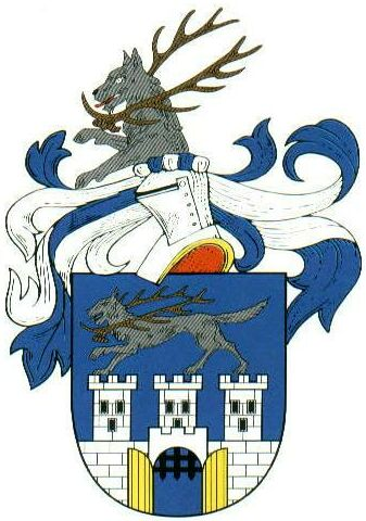 Znak obce Rabí.